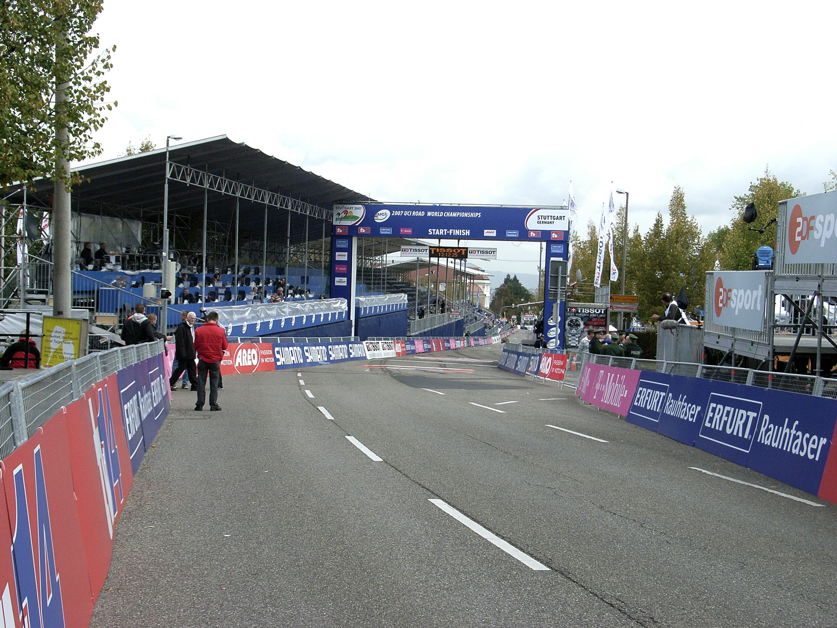 Dieses Bild zeigt die Start- und Ziellinie der Straßen-Radweltmeisterschaft 2007 in Stuttgart. Das Bild wurde mirt Blickrichtung Osten aufgenommen.